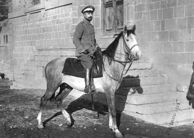 Meinem Lebenskameraden zum 3. April 1915